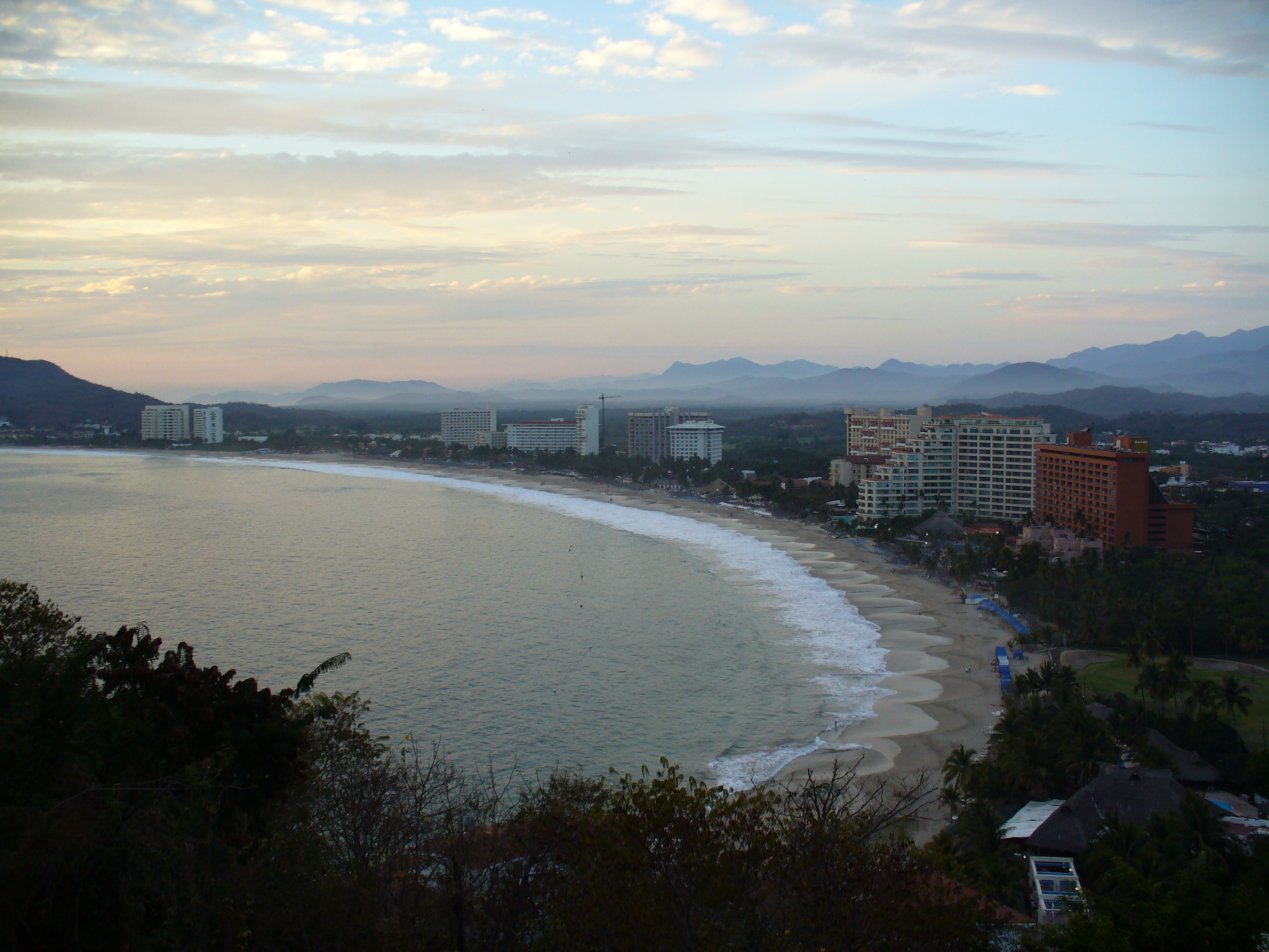 Bahia principal de ixtapa "El palmar"